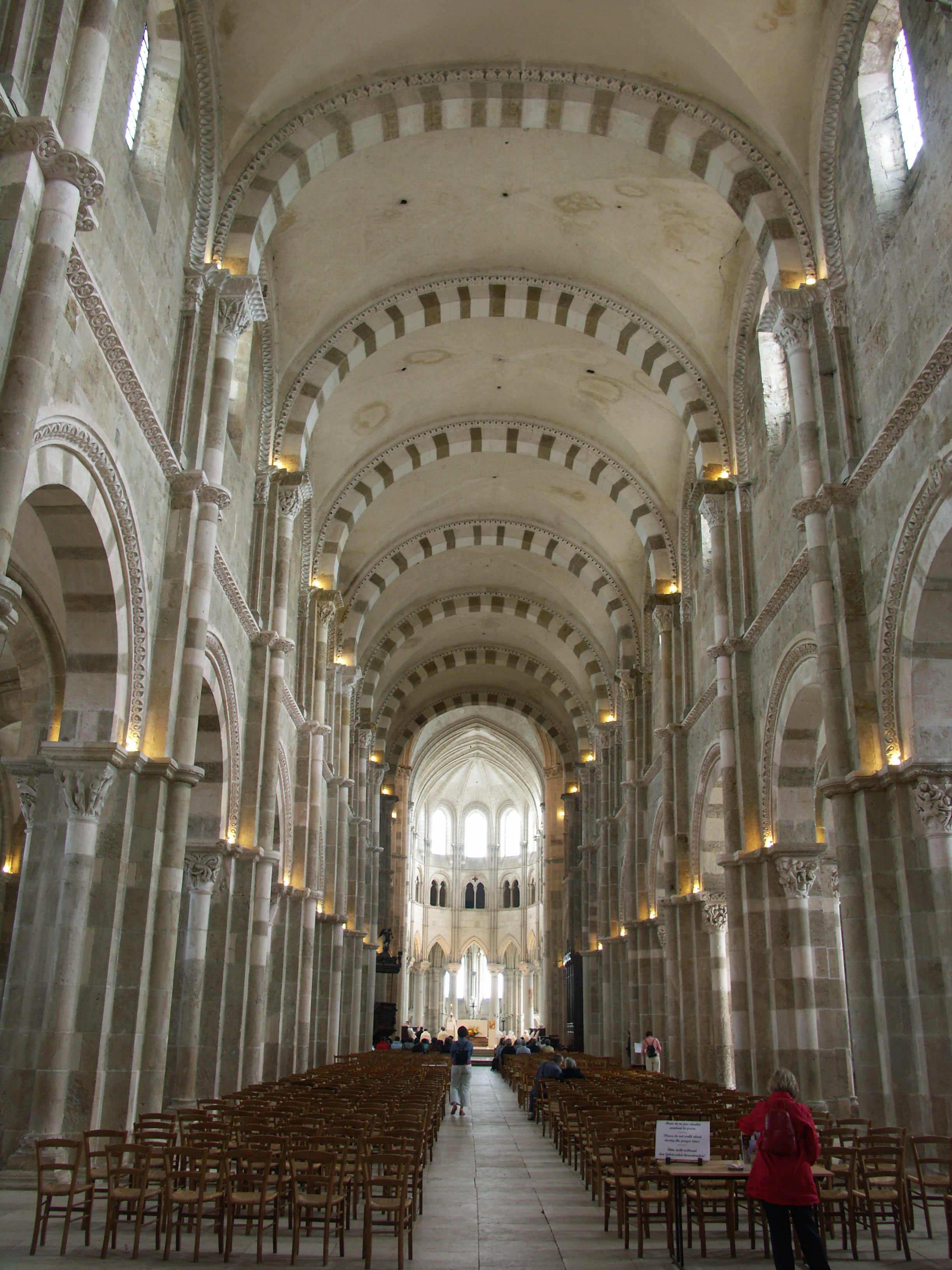 Nef de la Basilique de Vezelay